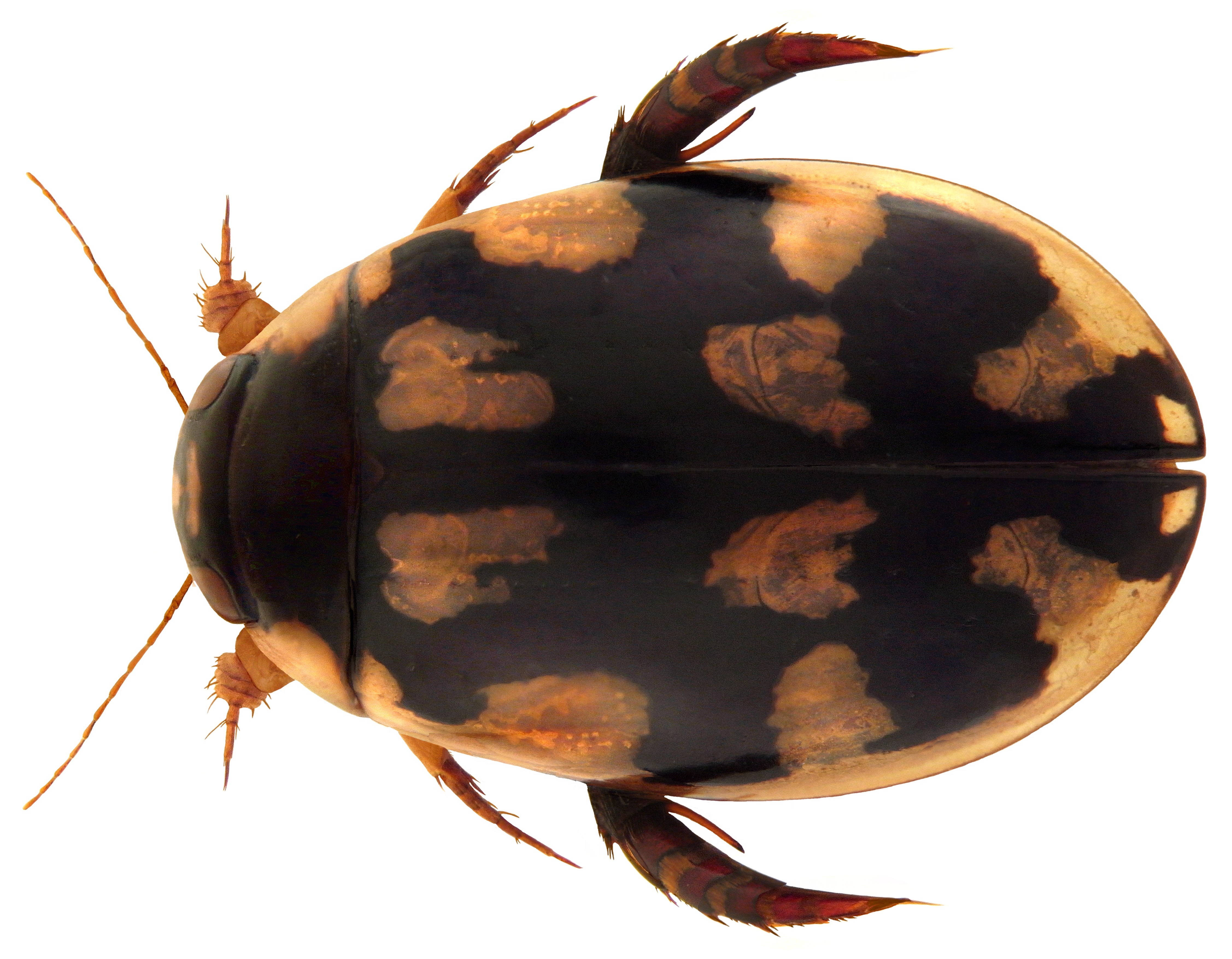 Sandracottus rotundus Familie: Dytiscidae Groesse: 13,3 mm Fundort: Indonesien, Sulawesi, Mouting, Raja Basar leg.det. A.Skale, 2009 Photo: U.Schmidt, 2010